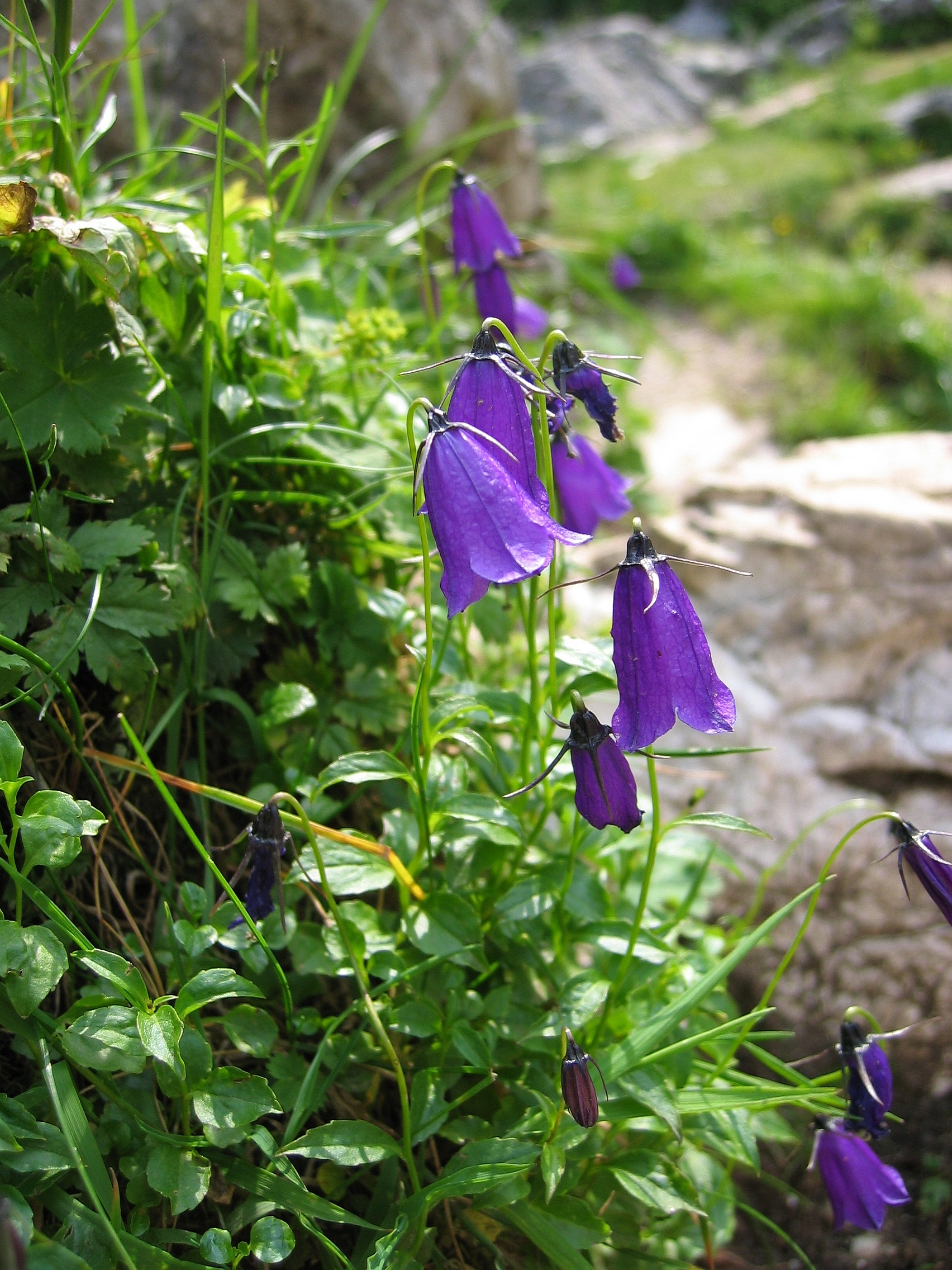 Campanula pulla, Wurzeralm, Upper Austria, Austria